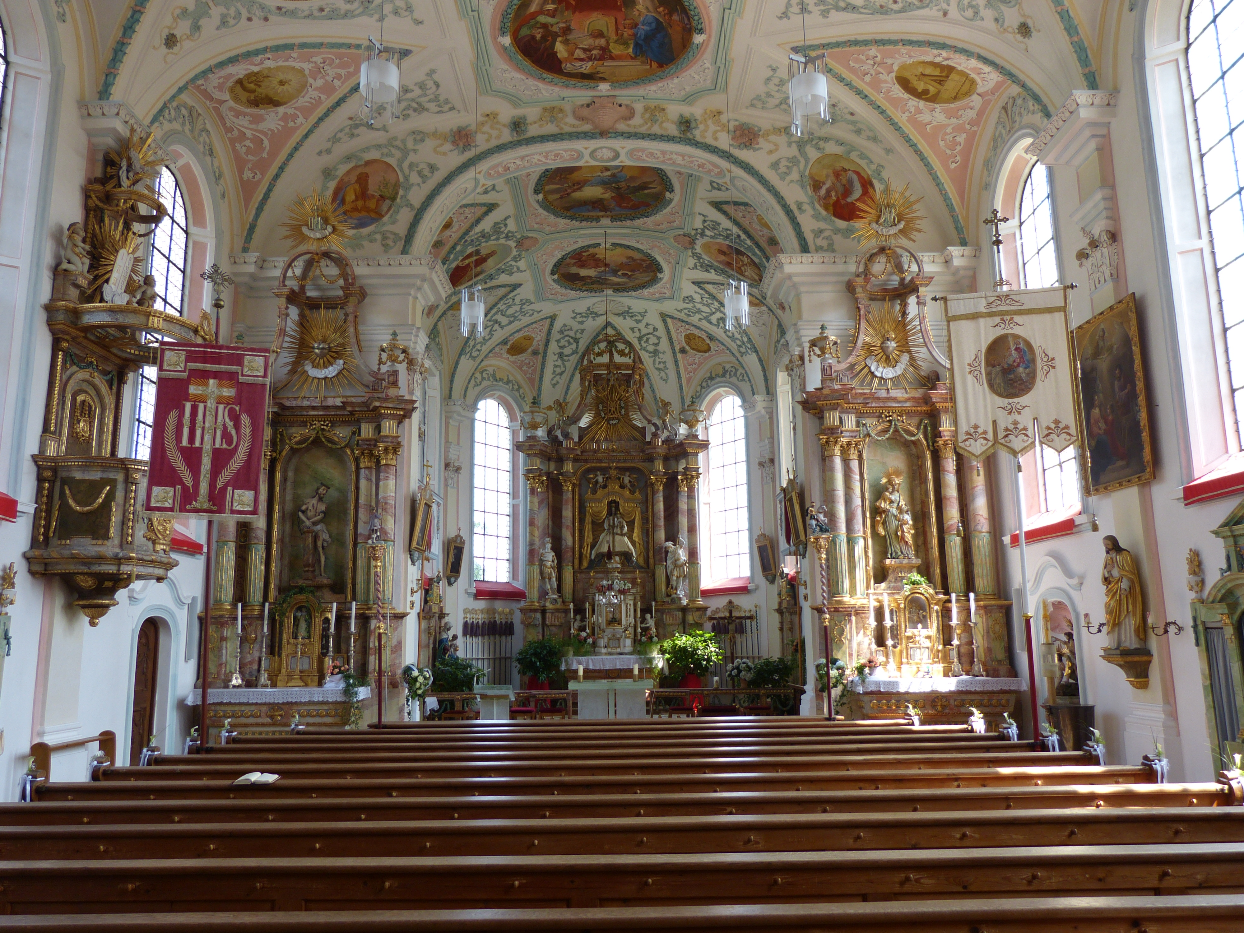 St. Georg, Kirch-Siebnach bei Ettringen, Landkreis Unterallgäu, Bayern, Deutschland